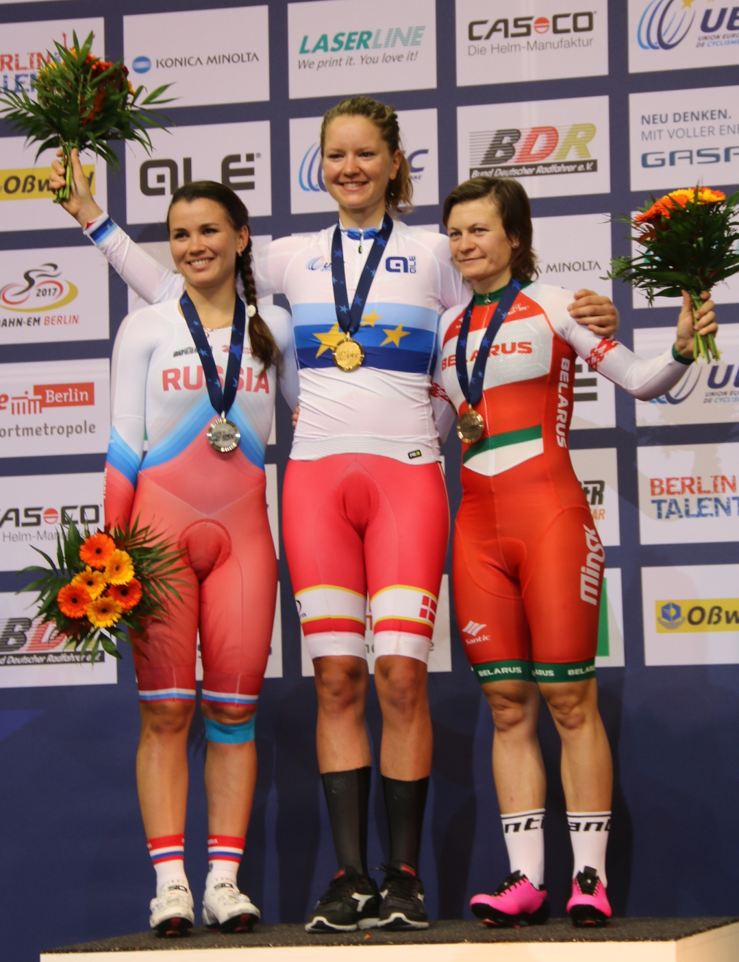 Podium Punktefahren, v.l.n.r.Gulnas Badykowa, Trine Schmidt, Tazzjana Scharakowa